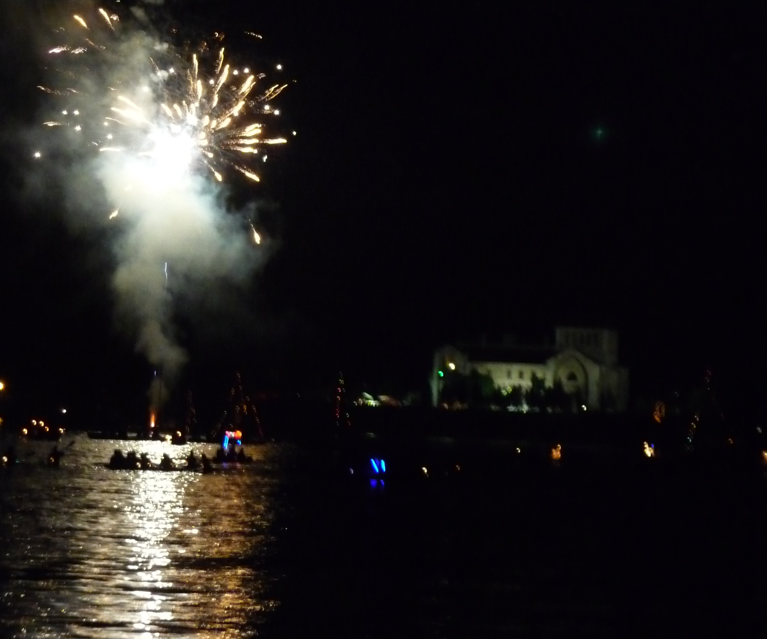 Tata, víz-zene-virág fesztivál, tűzijáték